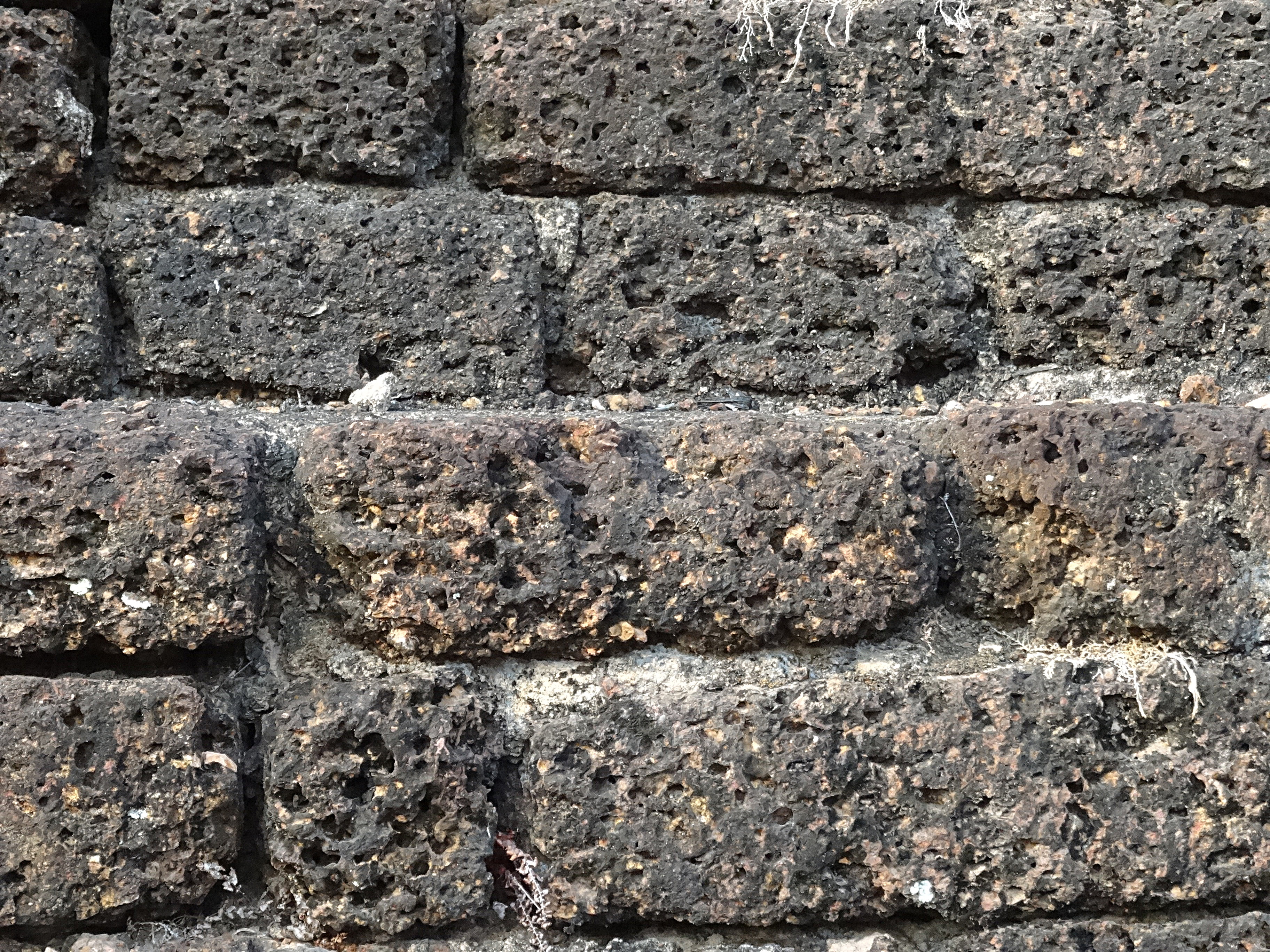 Die Laterit-Steine im Sukhothai Geschichtspark sind über 700 Jahre alte Zeugnisse des Alten Königreiches aus dem 13. Jahrhundert